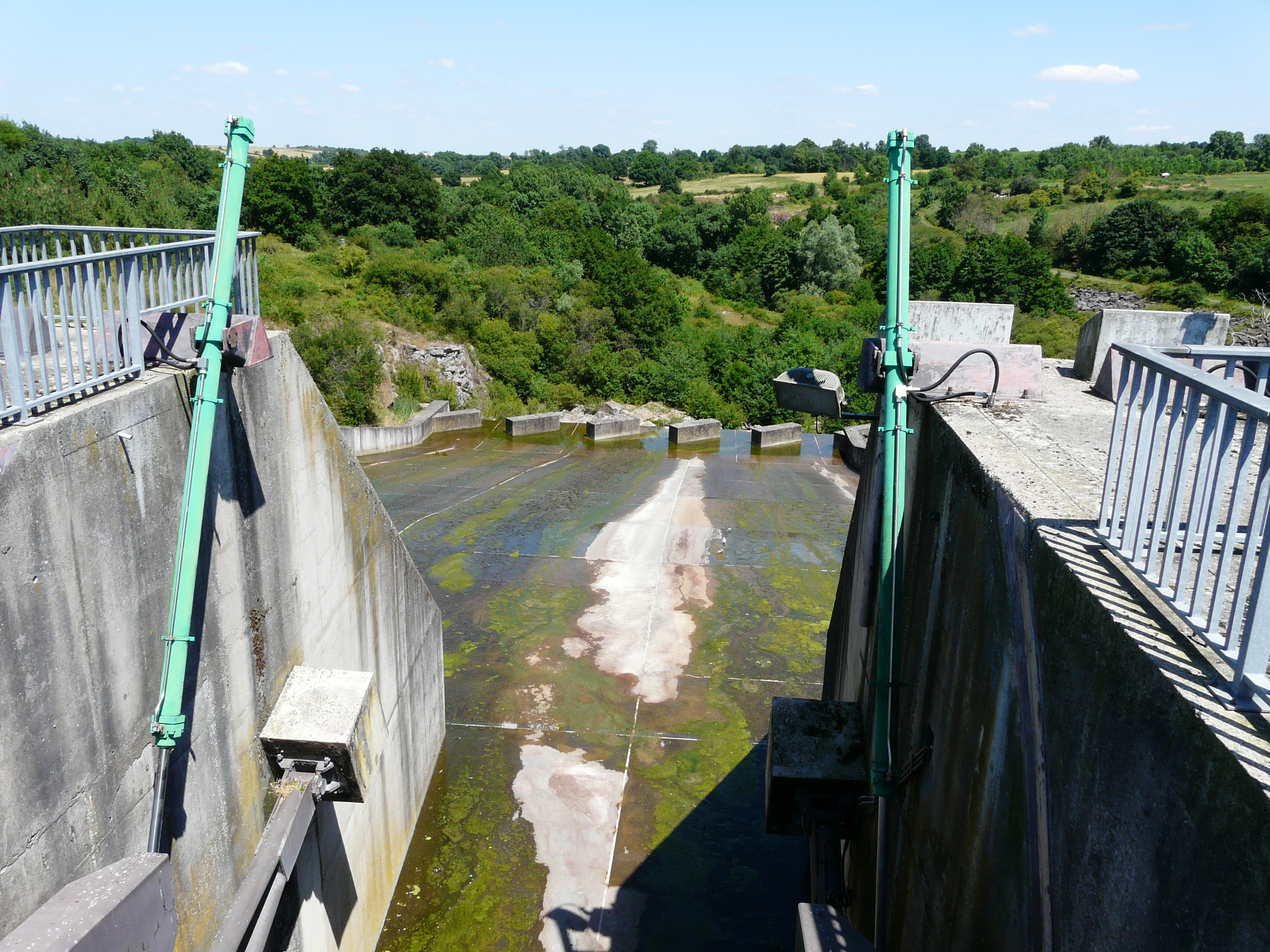 Le barrage du Cébron, entre les communes de Louin et Saint-Loup-Lamairé, Deux-Sèvres, France